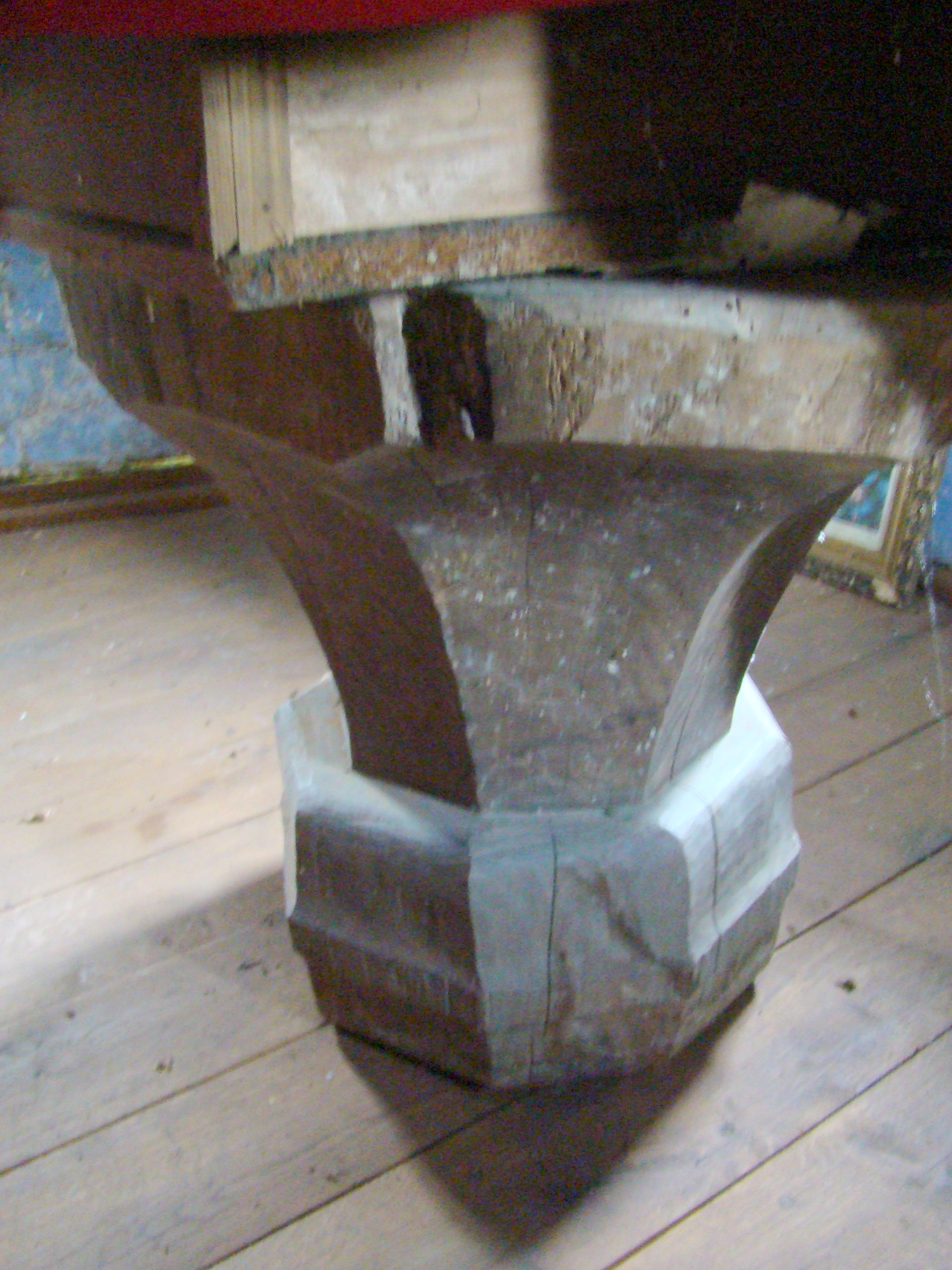 Biserica de lemn din Toplița, comuna Letca, judeţul Sălaj